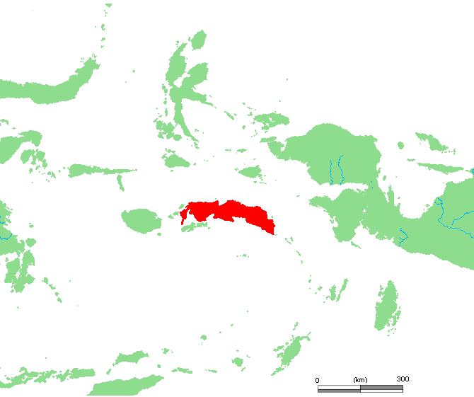 ID Seram.PNG